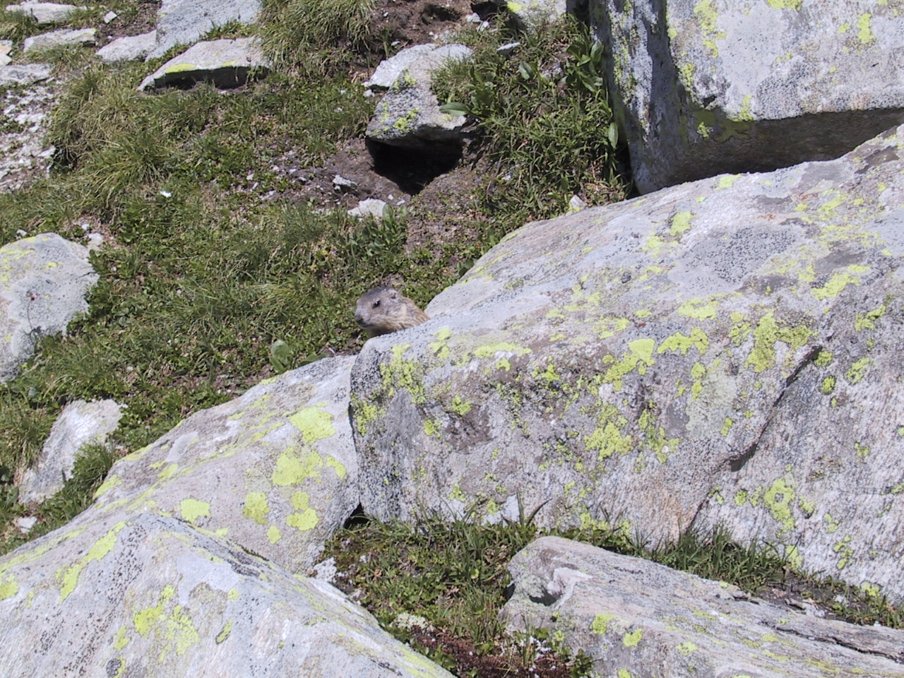 Murmeltier in den Blöcken des Tauerngneises in der Nähe der Edelrauthütte